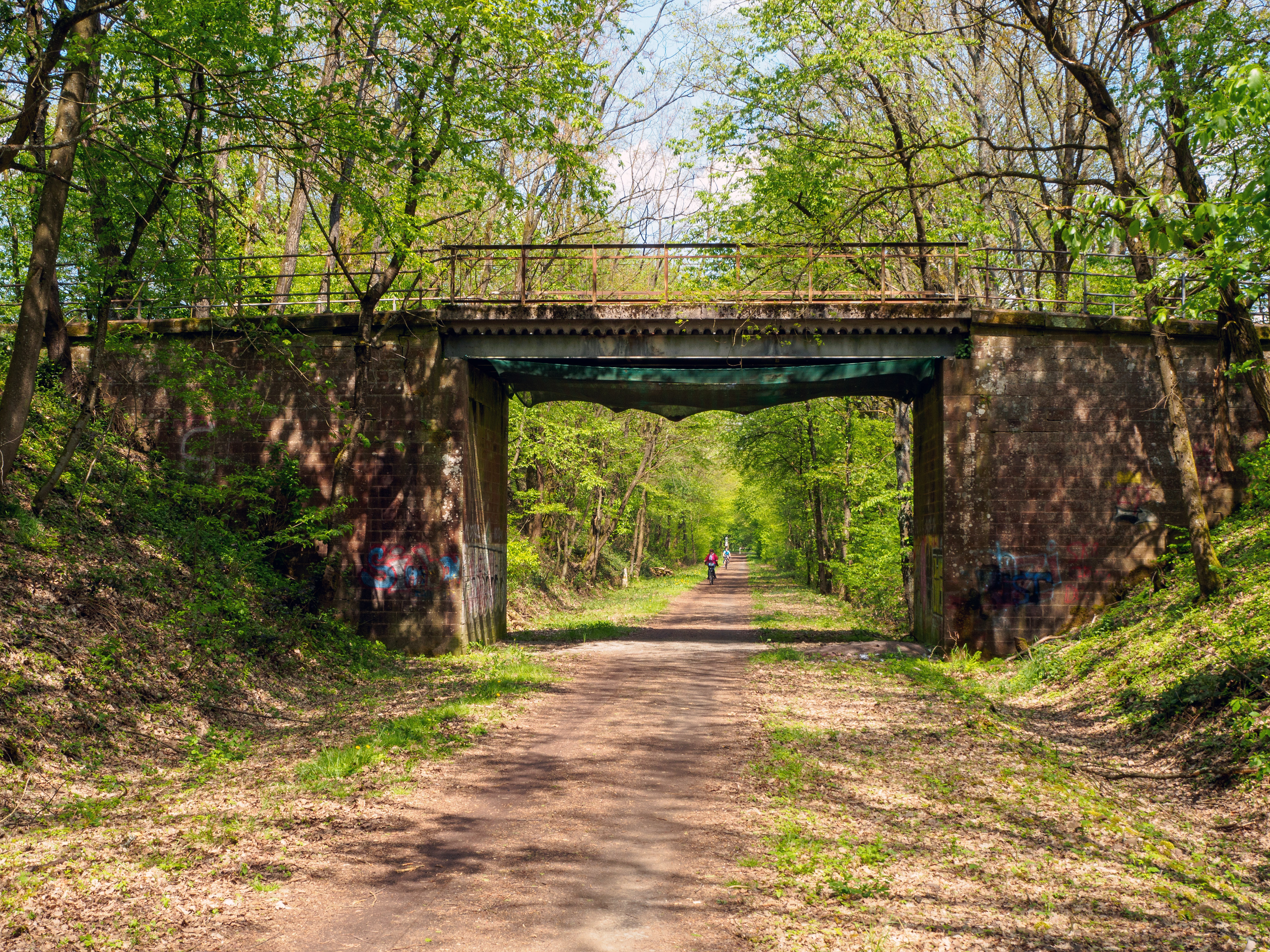 Brücke über die Strecke der Glantalbahn zwischen Waldmohr und Schönenberg-Kübelberg